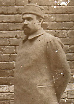 Аполлон Николаевич Кругликов (29 июля 1883, Красноярский уезд (Енисейская губерния) — 1919, РСФСР) — управляющий делами Директории, в Комиссии по организации власти на Уфимском государственном совещании (1918).